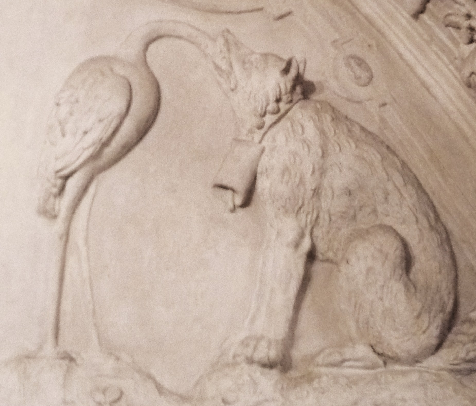 Relief im Kleinen Gewölbe am Wendelstein im Schloss Sondershausen, Darstellung: Aesop-Fabel Wolf und Storch aus dem Jahre 1616, Knorpelwerkstuck